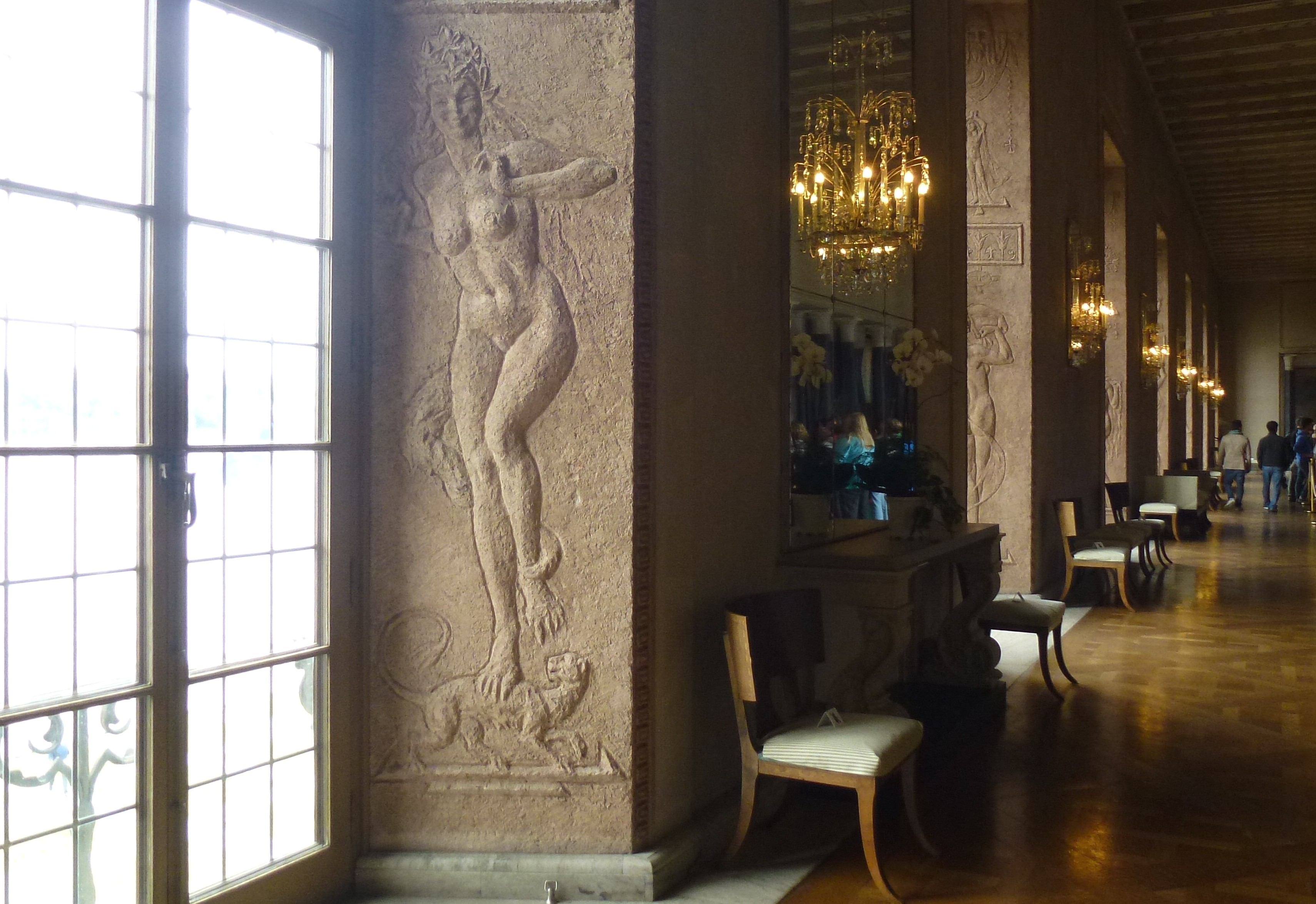 Prinsens galleri Stadshuset med J. A. G. Ackes stucker i fönsternischerna